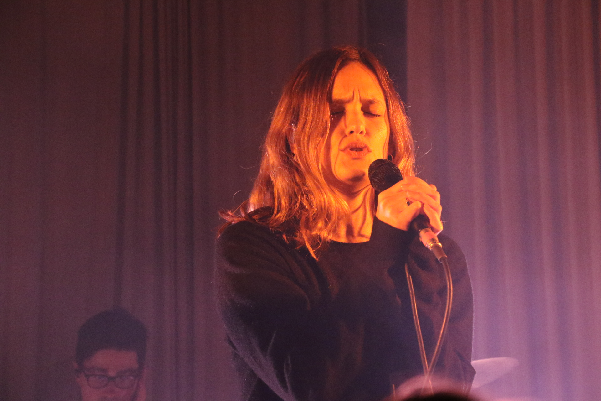 Wet ::: Summit Music Hall ::: 03.19.10